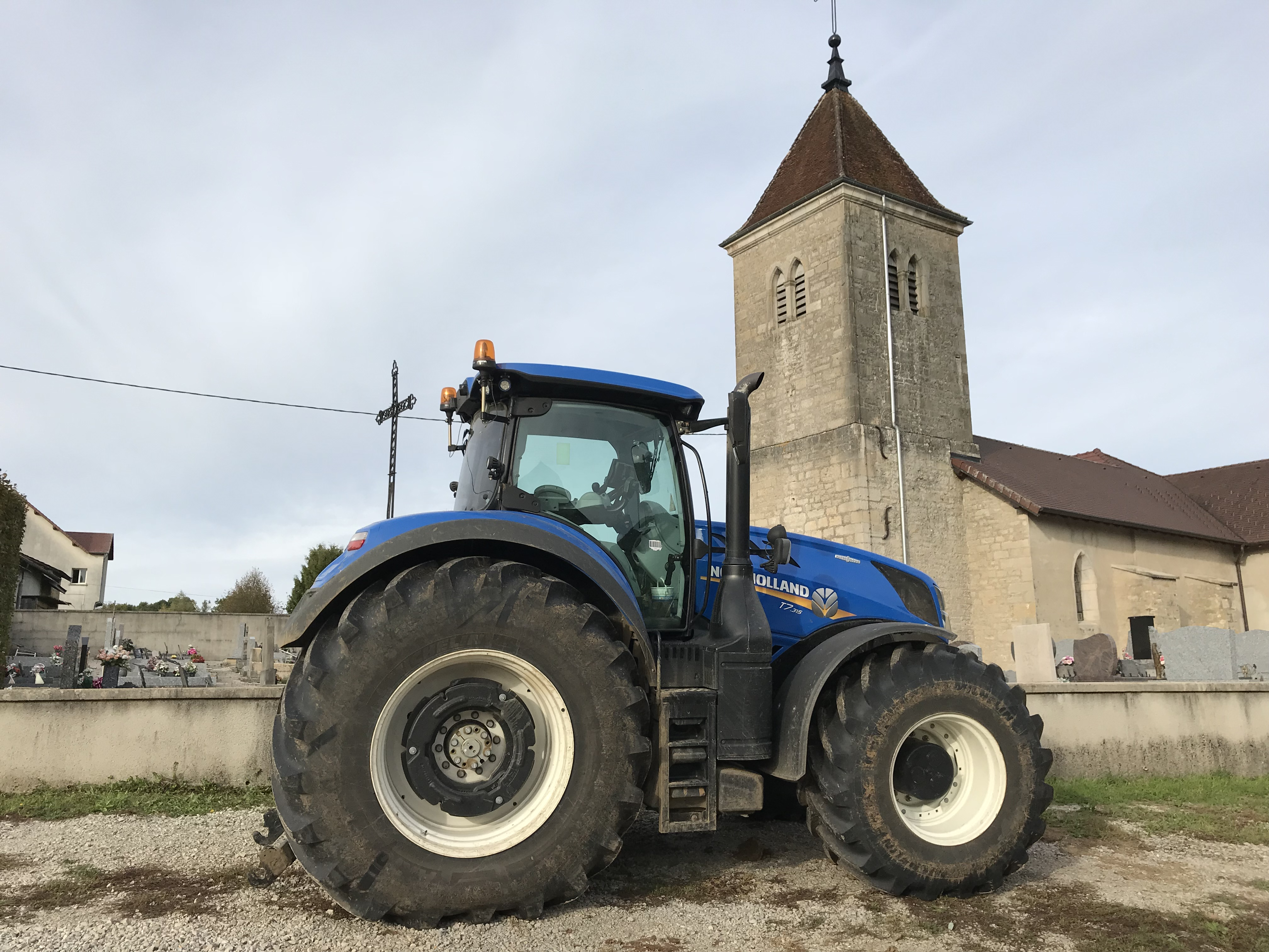 Tracteur New Holland T7.315 garé devant l'église de Rothonay (Jura, France) en octobre 2017.